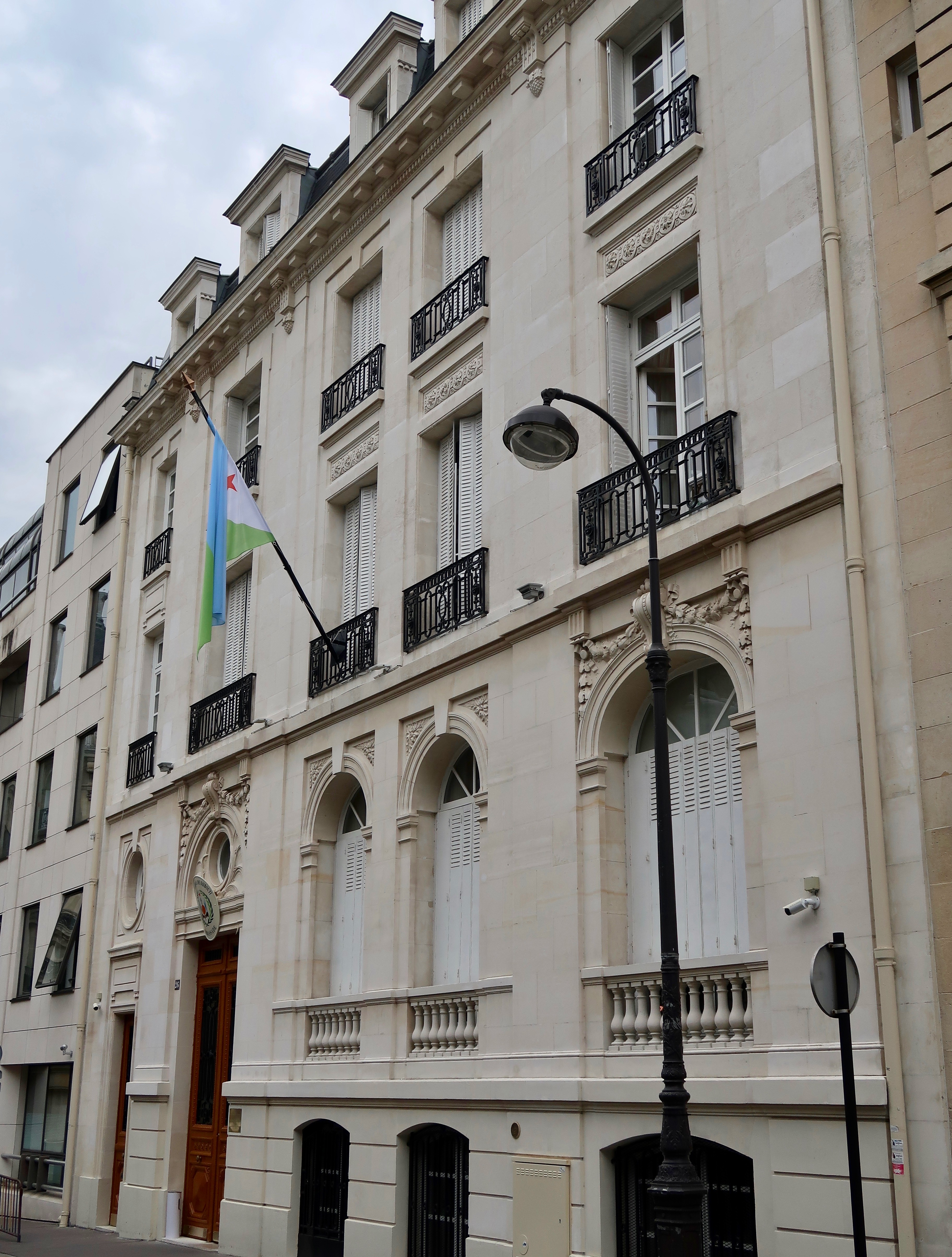 Ambassade de Djibouti en France, 26 rue Émile-Menier (Paris 16e).